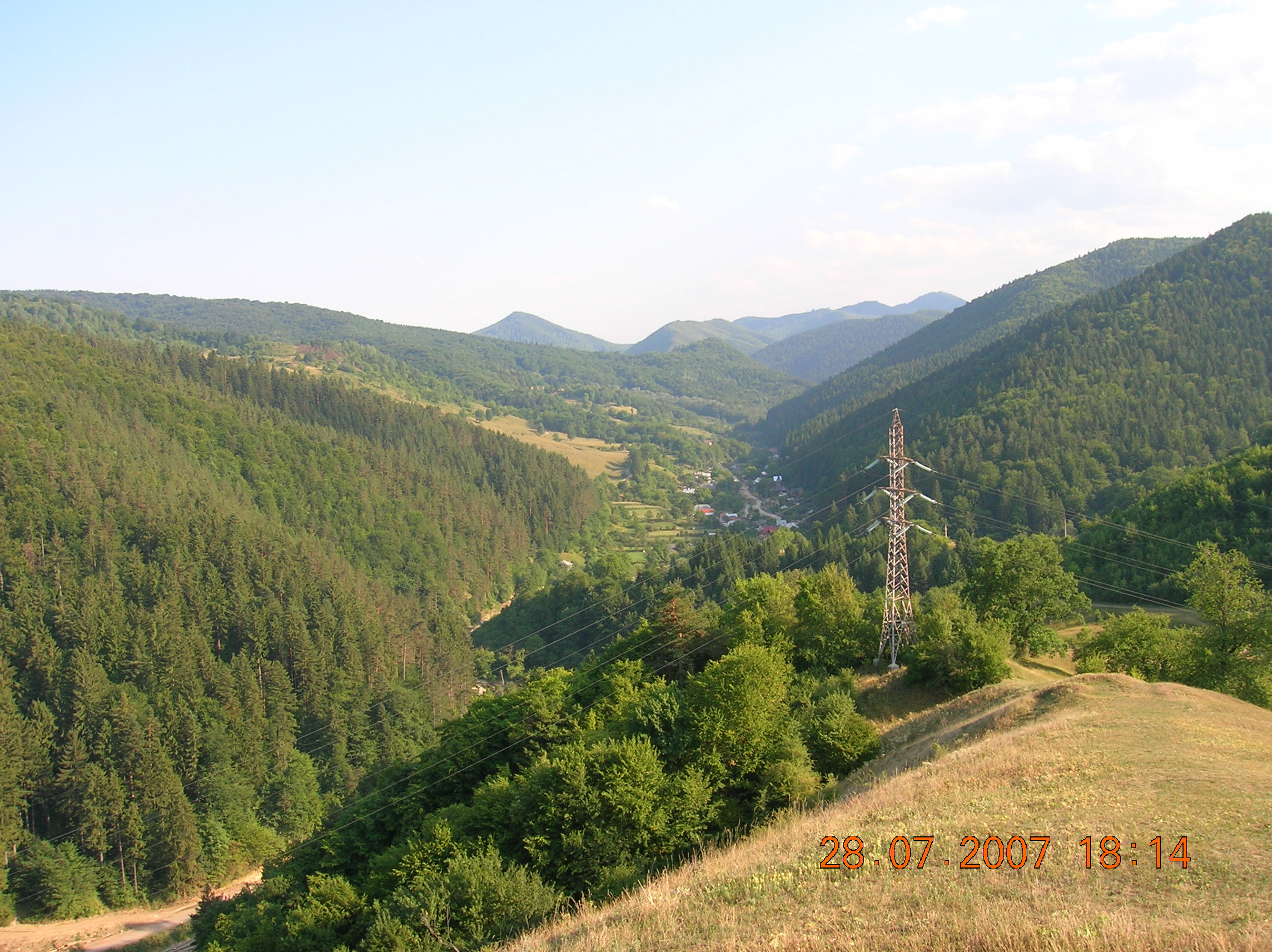 Munţii Tarcăului (Carpaţii Orientali, România)-Valea pârâului Doamna-de pe Bâtca Doamnei